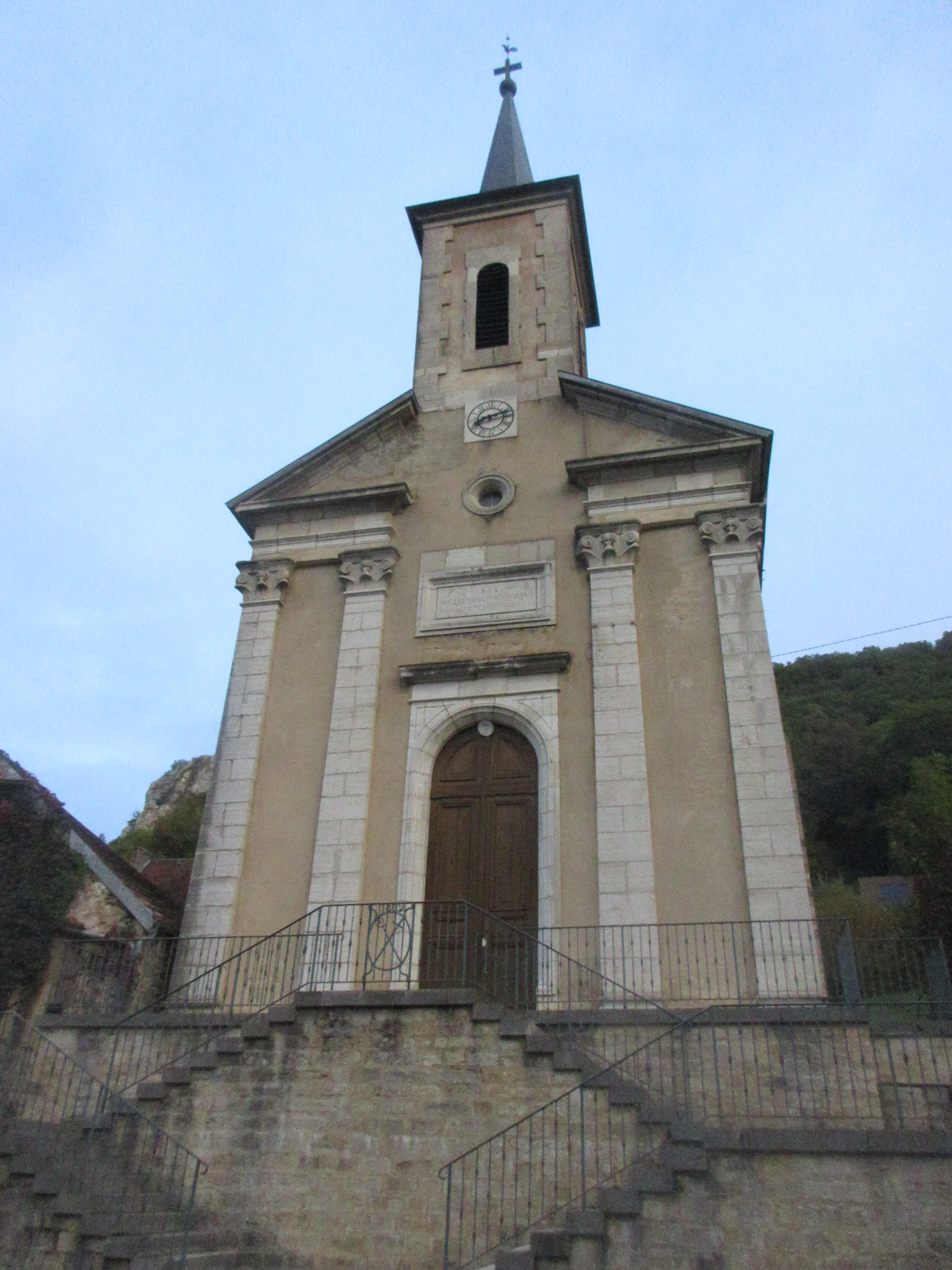 Église Saint-Étienne de Pretin.